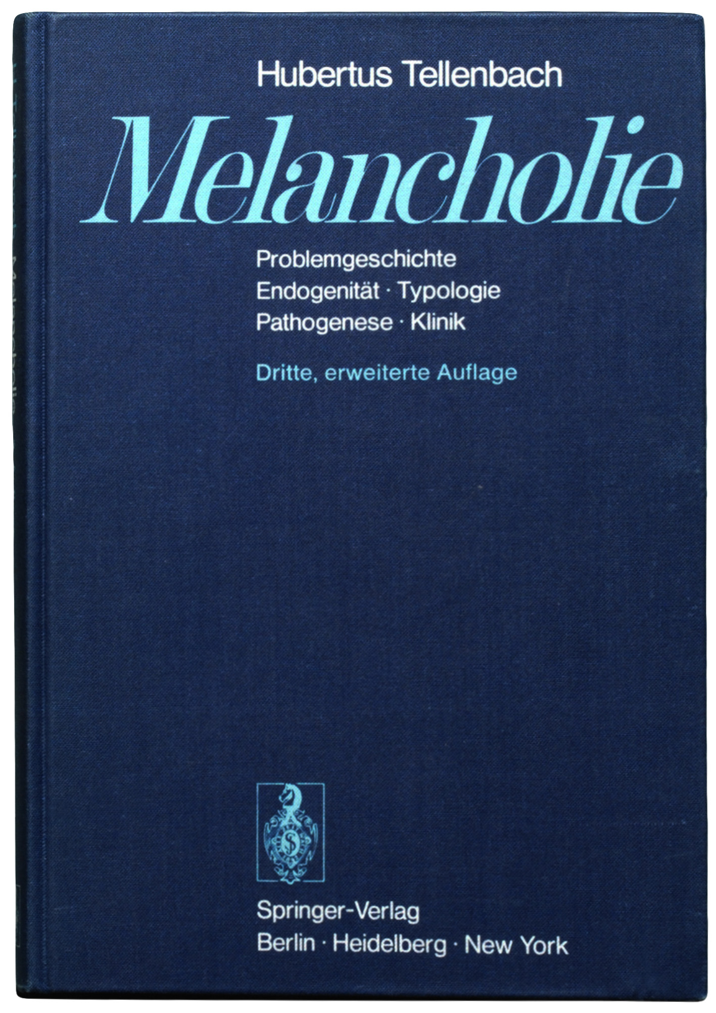 Tellenbach, Hubertus: Melancholie. Heidelberg 1976 (3. Aufl)